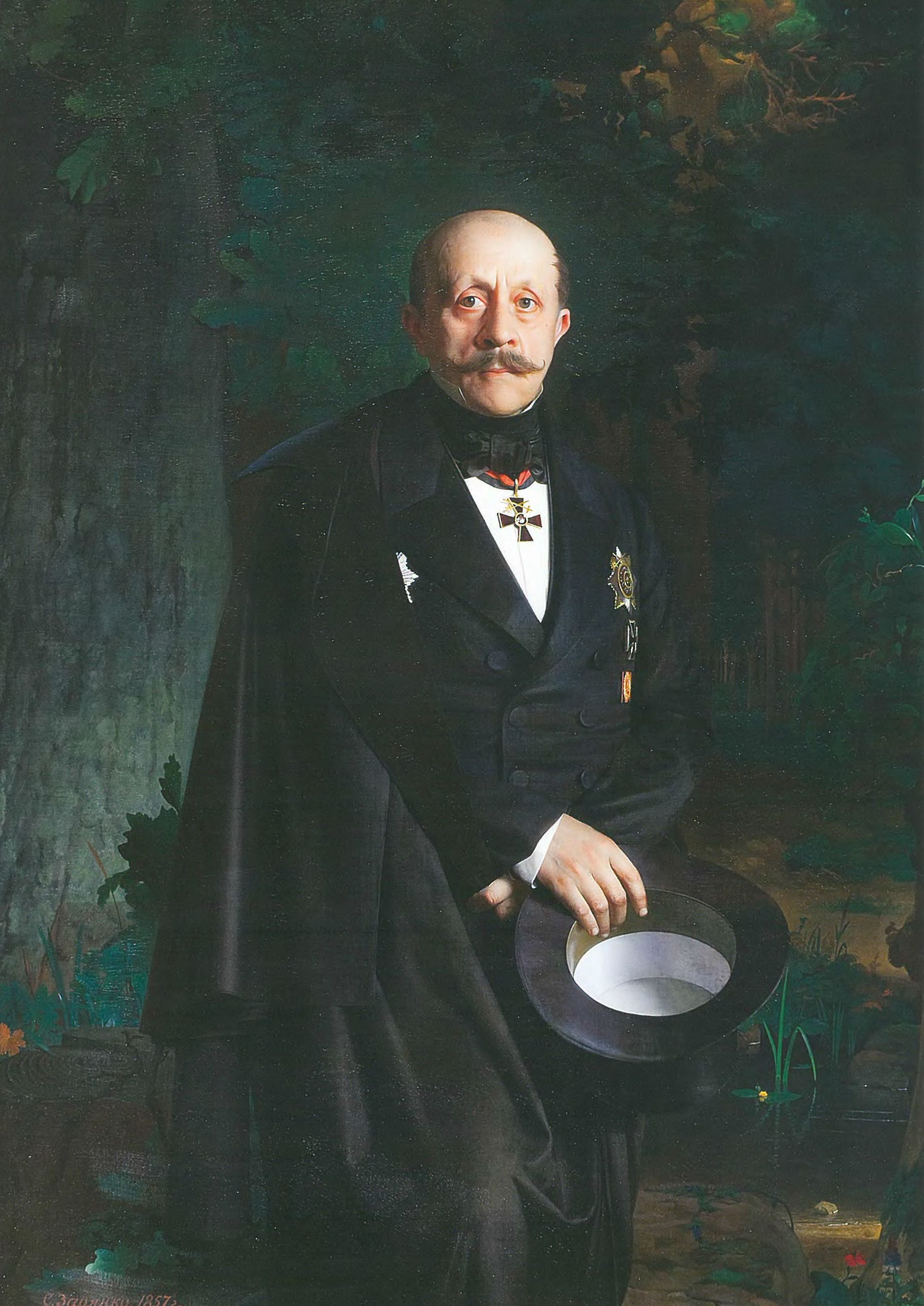 С. Зарянко. Портрет А. Д. Черткова. ГИМ, 1857